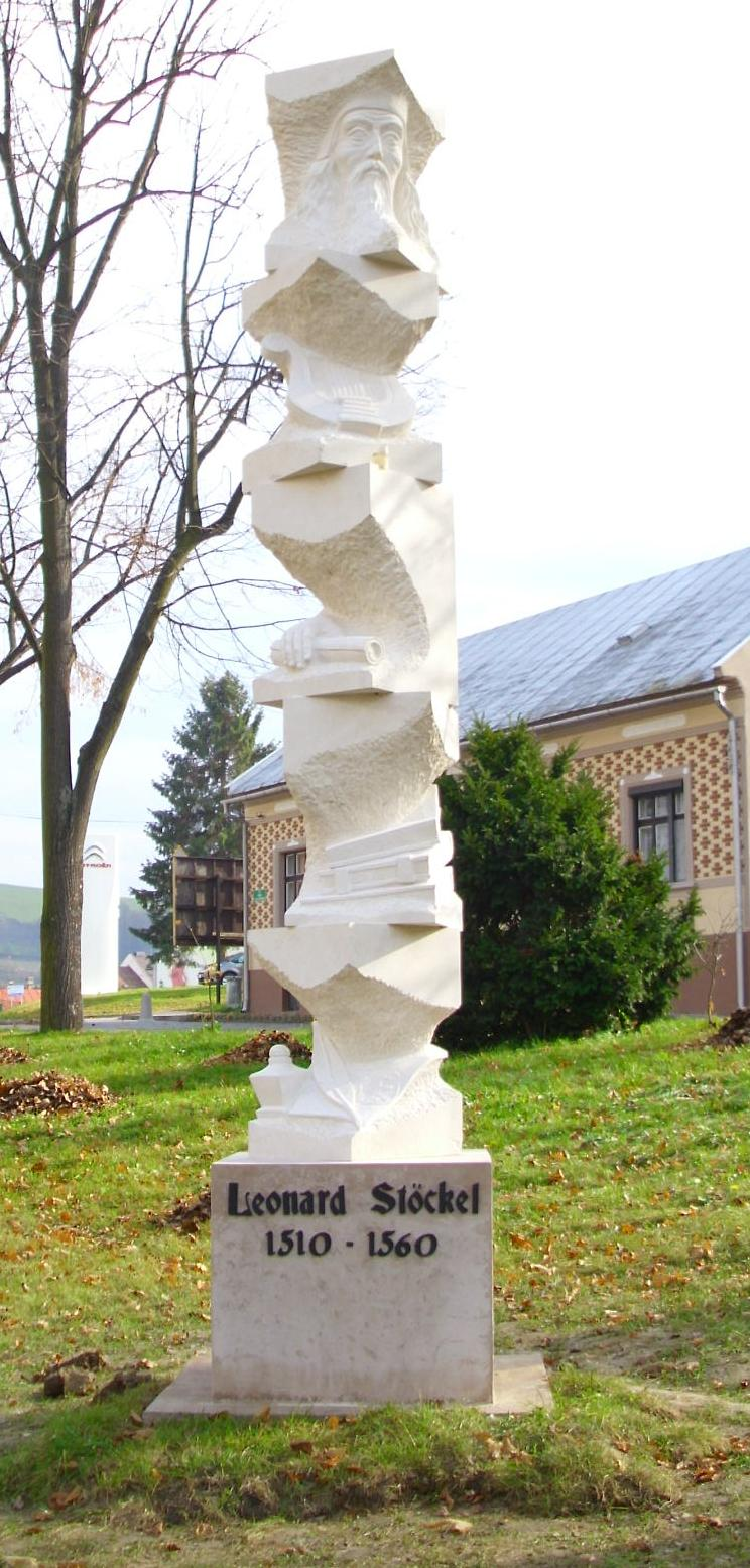 Pamätník Leonarda Stöckela v mestskom parku pri Gymnáziu L. Stöckela v Bardejove.